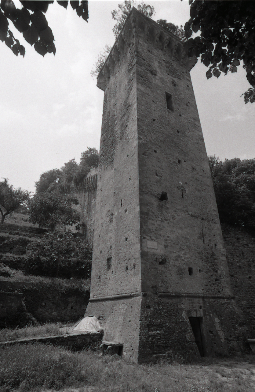 Servizio fotografico : Vicopisano, 1975 / Paolo Monti. - Strisce: 7, Fotogrammi complessivi: 36 : Negativo b/n, gelatina bromuro d'argento/ pellicola ; 35 mm. - ((Sul portanegativi: N[I]K[MA]T FP4. - Occasione: Pubblicazione. - Agenda di Paolo Monti: Leica 1501-3000 Controllo numerazione (1950-1978), presso Archivio Paolo Monti. - Fonte: Monografia di Battisti, Eugenio: Filippo Brunelleschi, Milano, Electa, edizione italiana (1976). - Fonte: Fattura di Paolo Monti: IV. Commesse/ Fattura n. 19 (1975/08/18), presso Archivio Paolo Monti. - Fonte